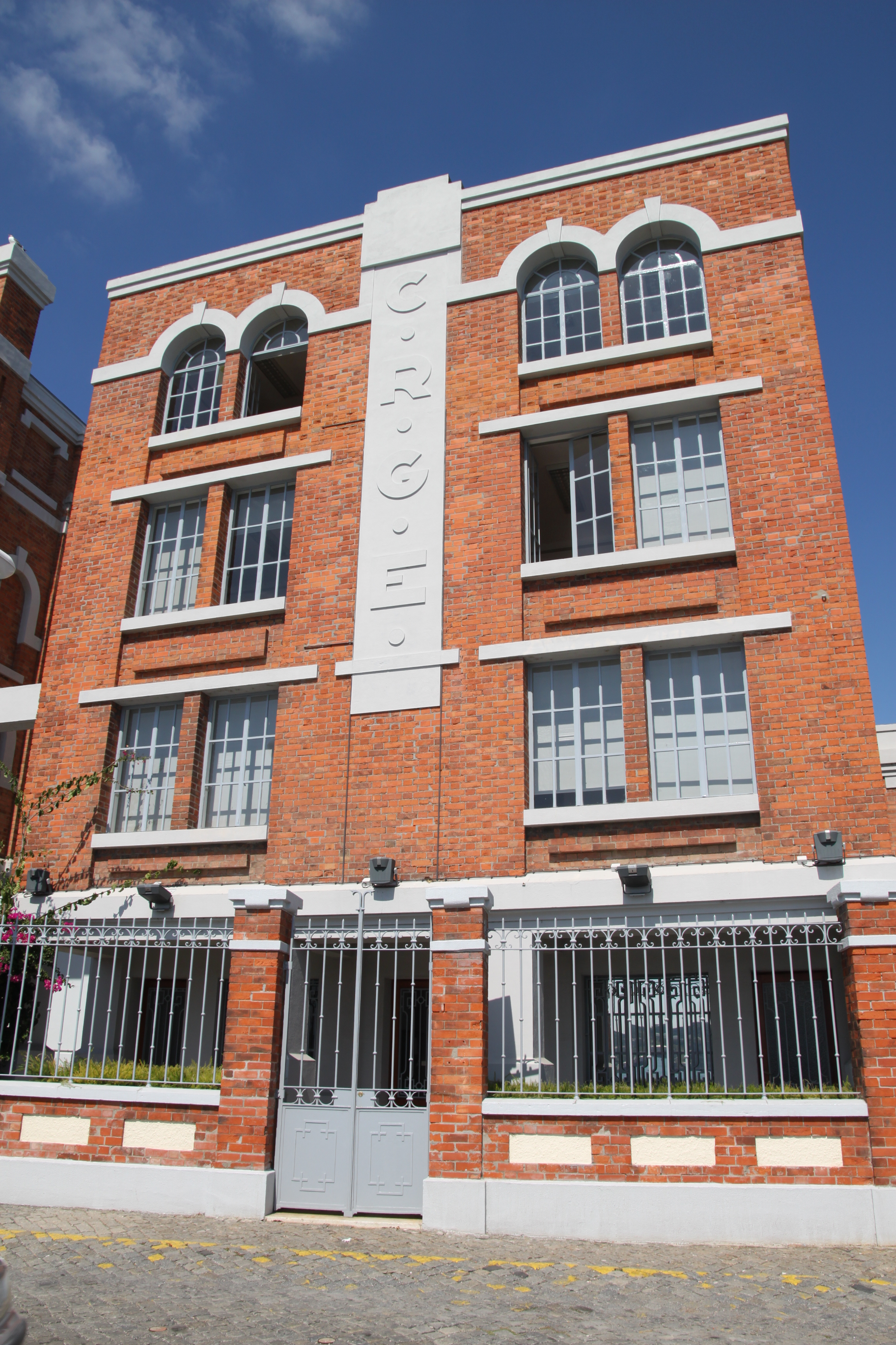 Central Tejo This file was uploaded for Wiki Loves Monuments in Portugal with the unique identifier 73123.